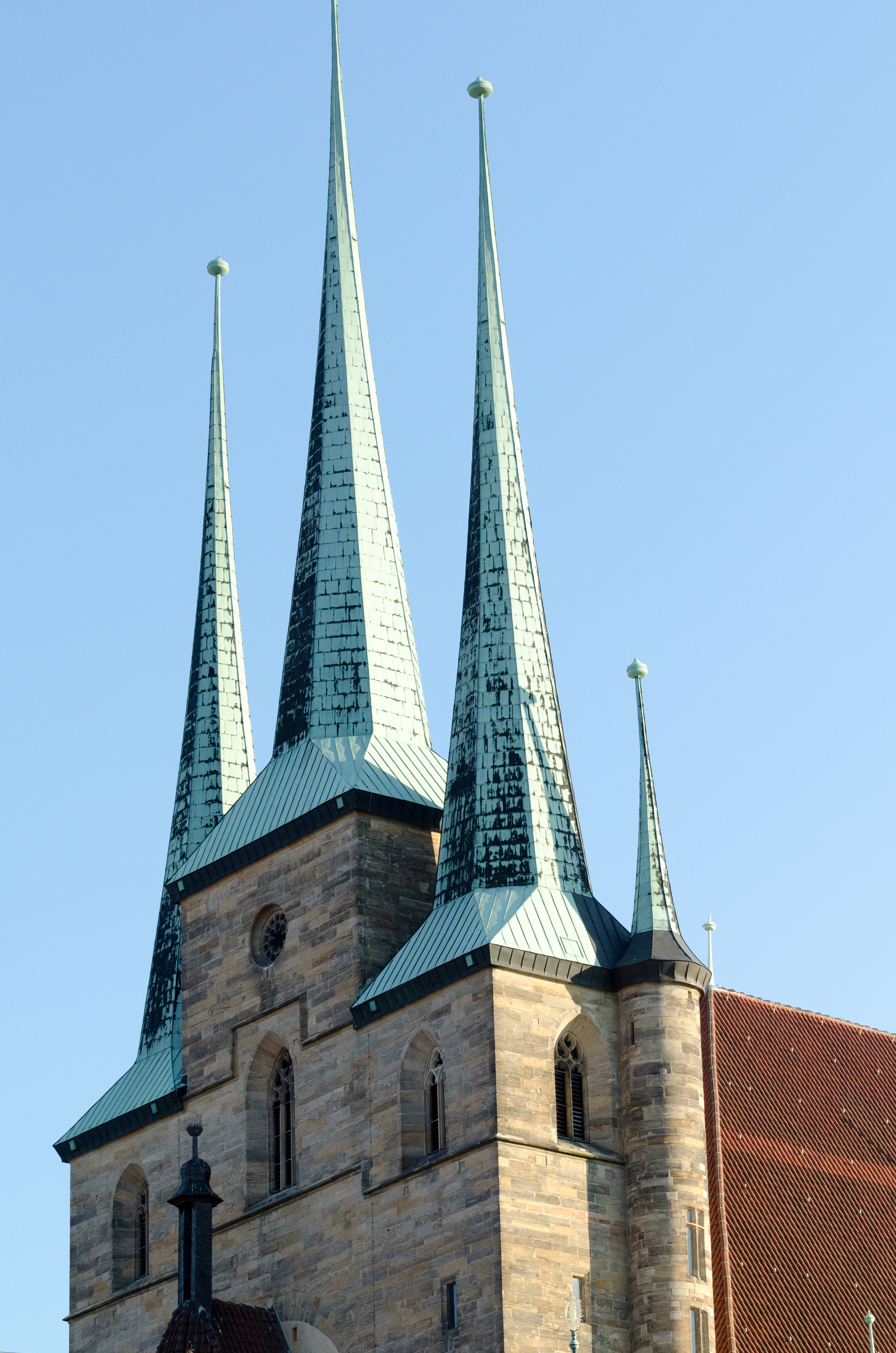 Erfurt, St. Severi, 2015